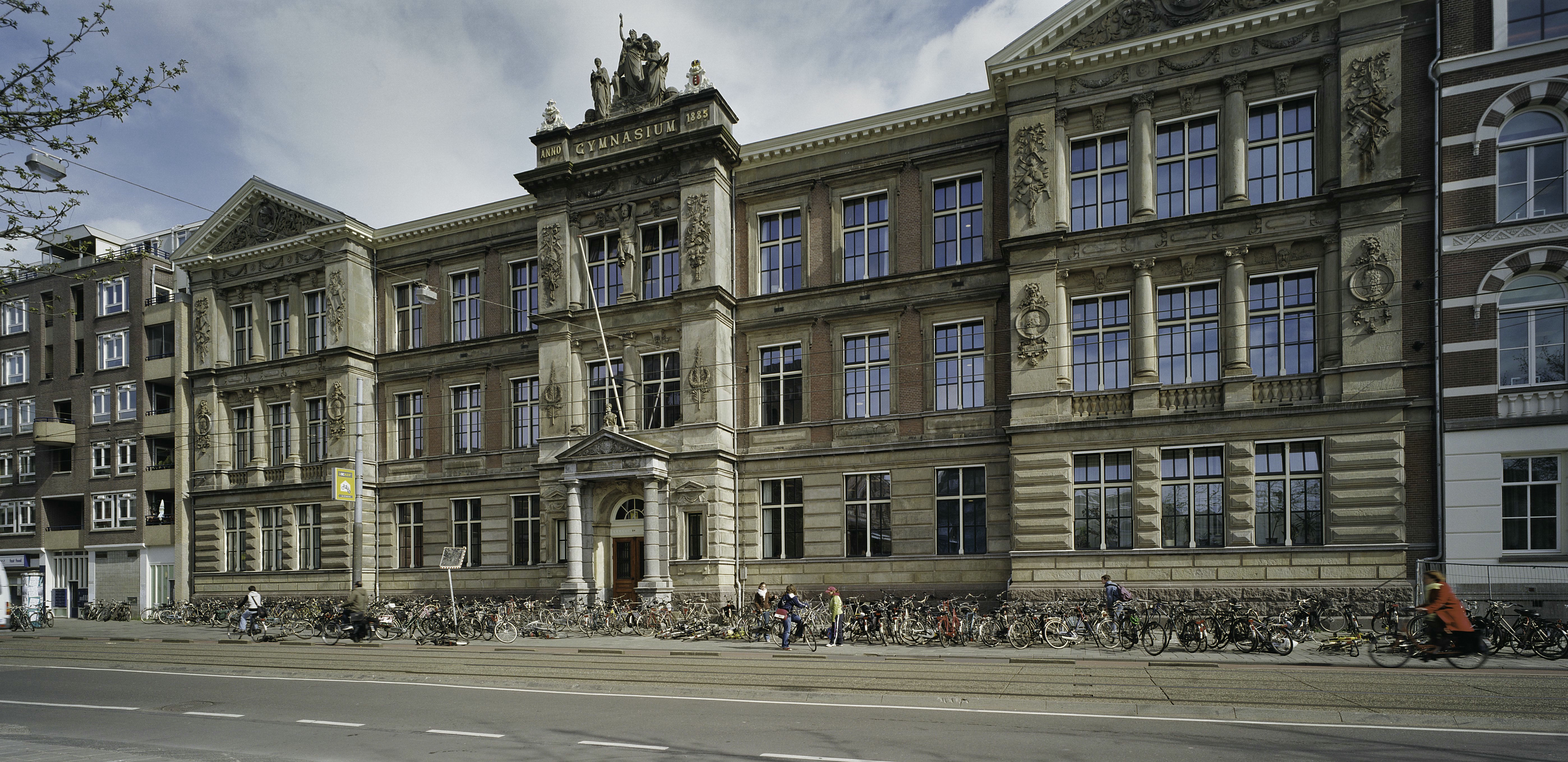 Het Barlaeusgymnasium: Overzicht, natuurstenen voorgevel, een middenrisaliet met attiek (opmerking: Gefotografeerd voor Monumenten In Nederland Noord-Holland)